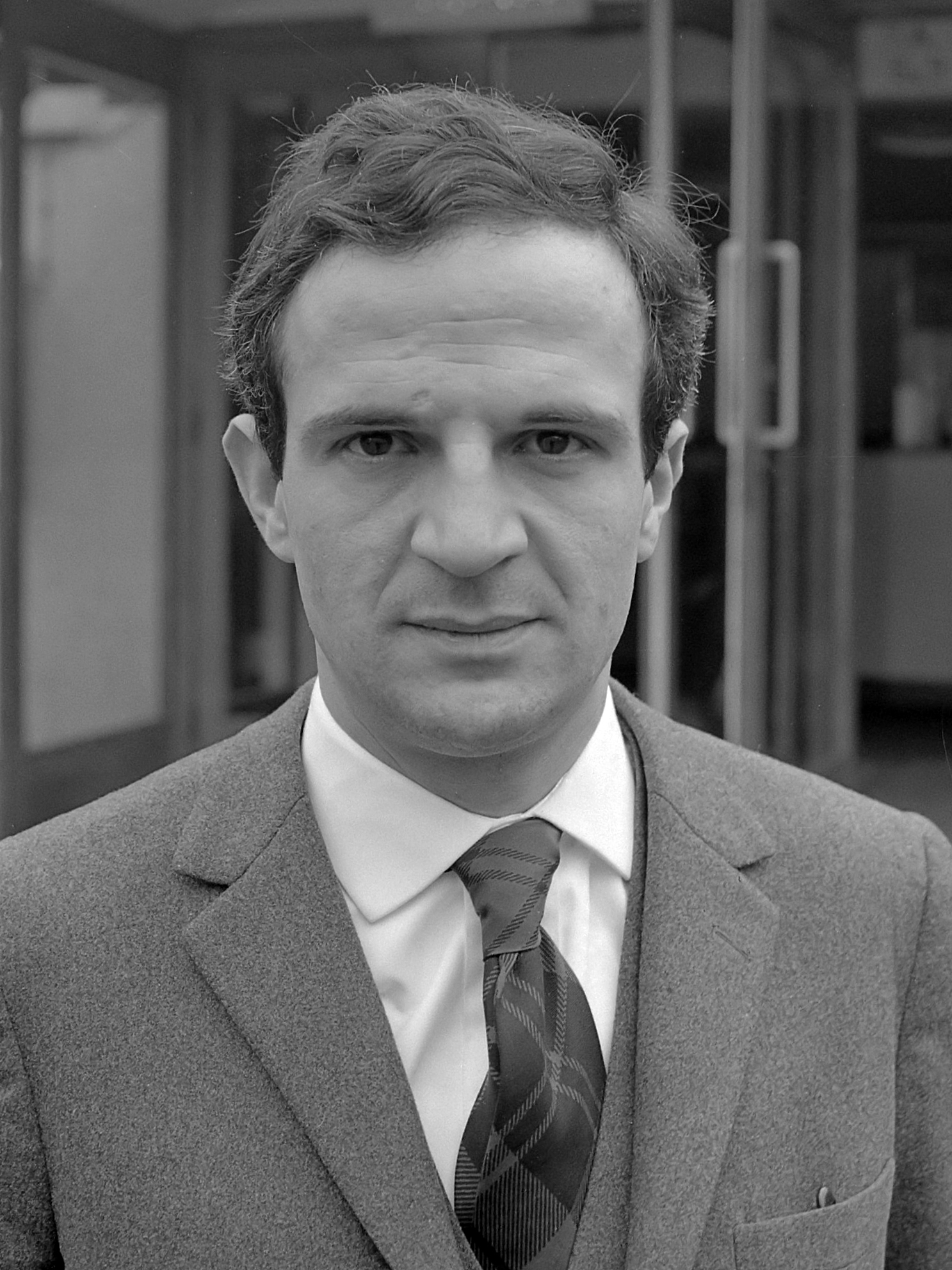 Franse regisseur Francois Truffaut voor bioscoop Cinétol, waar zijn film draait [Le Peau Douce?] tijdens Nouvelle Vague festival 15 maart 1965